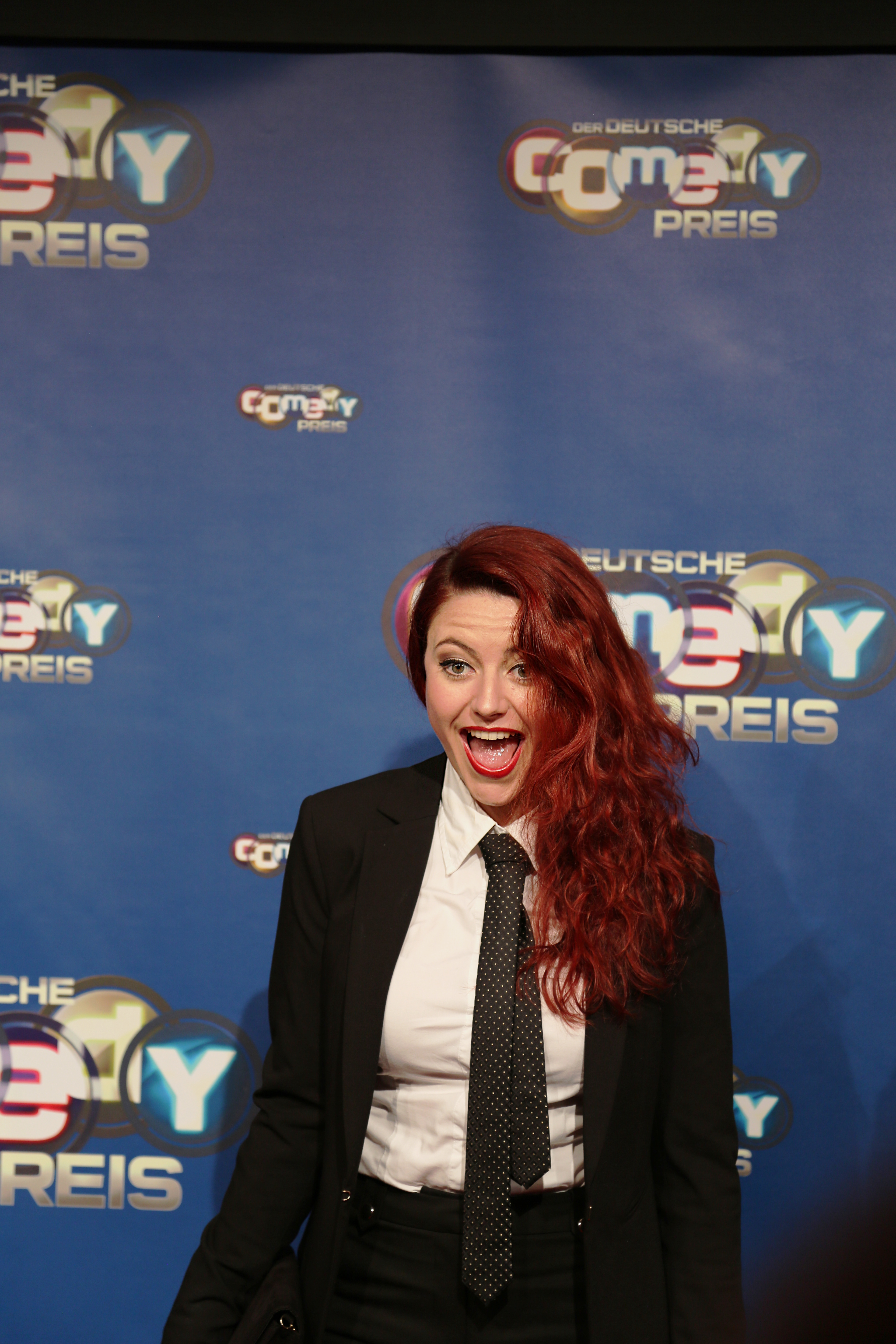 Tahnee Schaffarczyk beim Deutschen Comedypreis 2017.